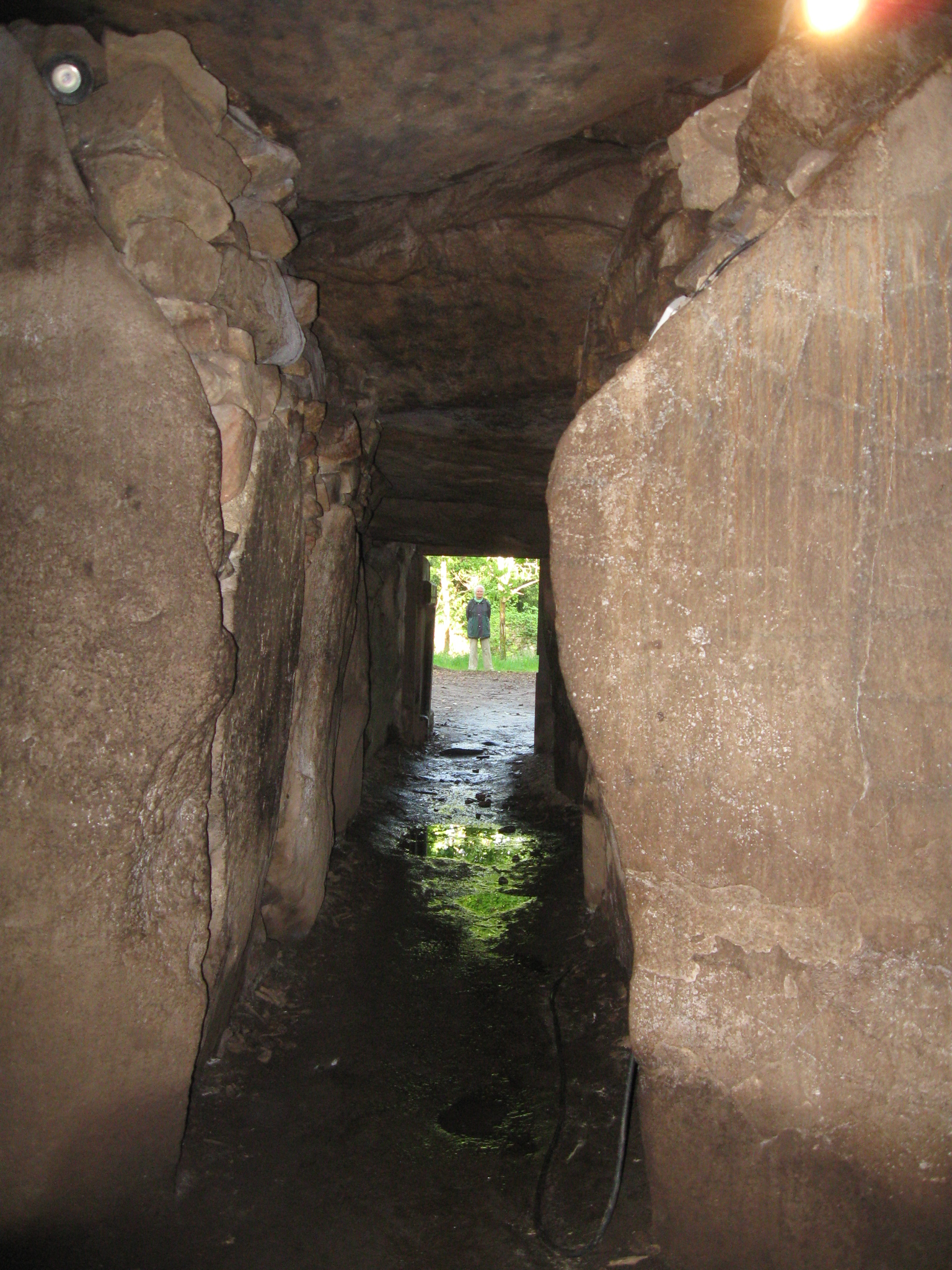 Dolmengang Tumulus Kergado